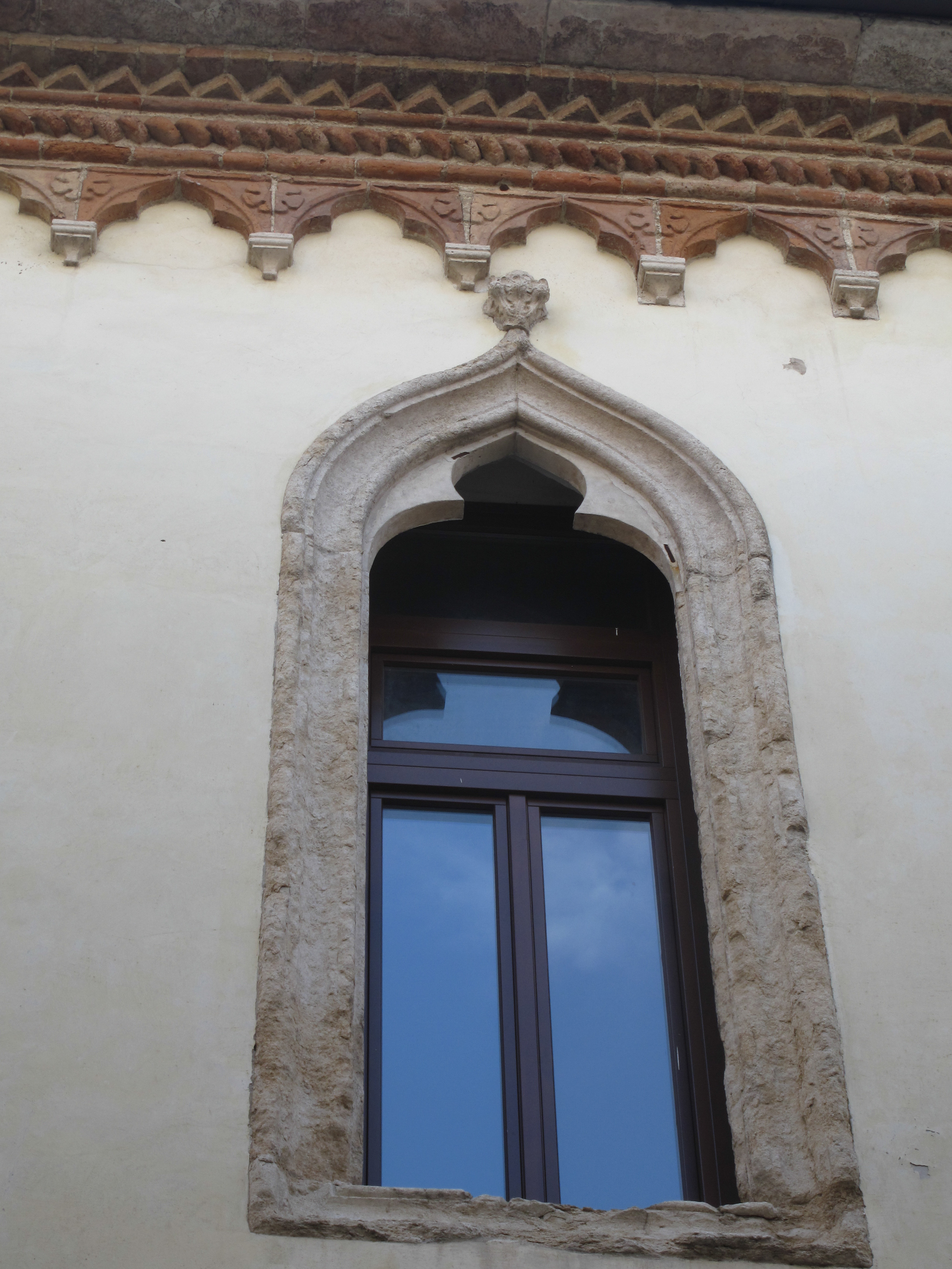 Ospedale di Santa Maria e Cristoforo (San Marcello) - monofora